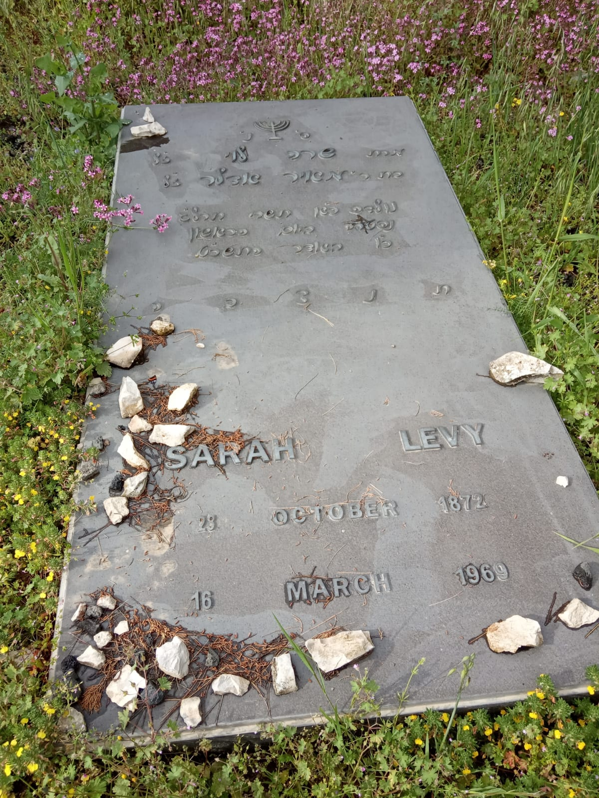 מצבת קברה של שרה לוי